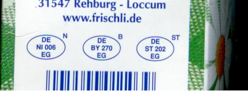 Aufdruck auf einer deutschen Milchpackung (Tetra Pak)